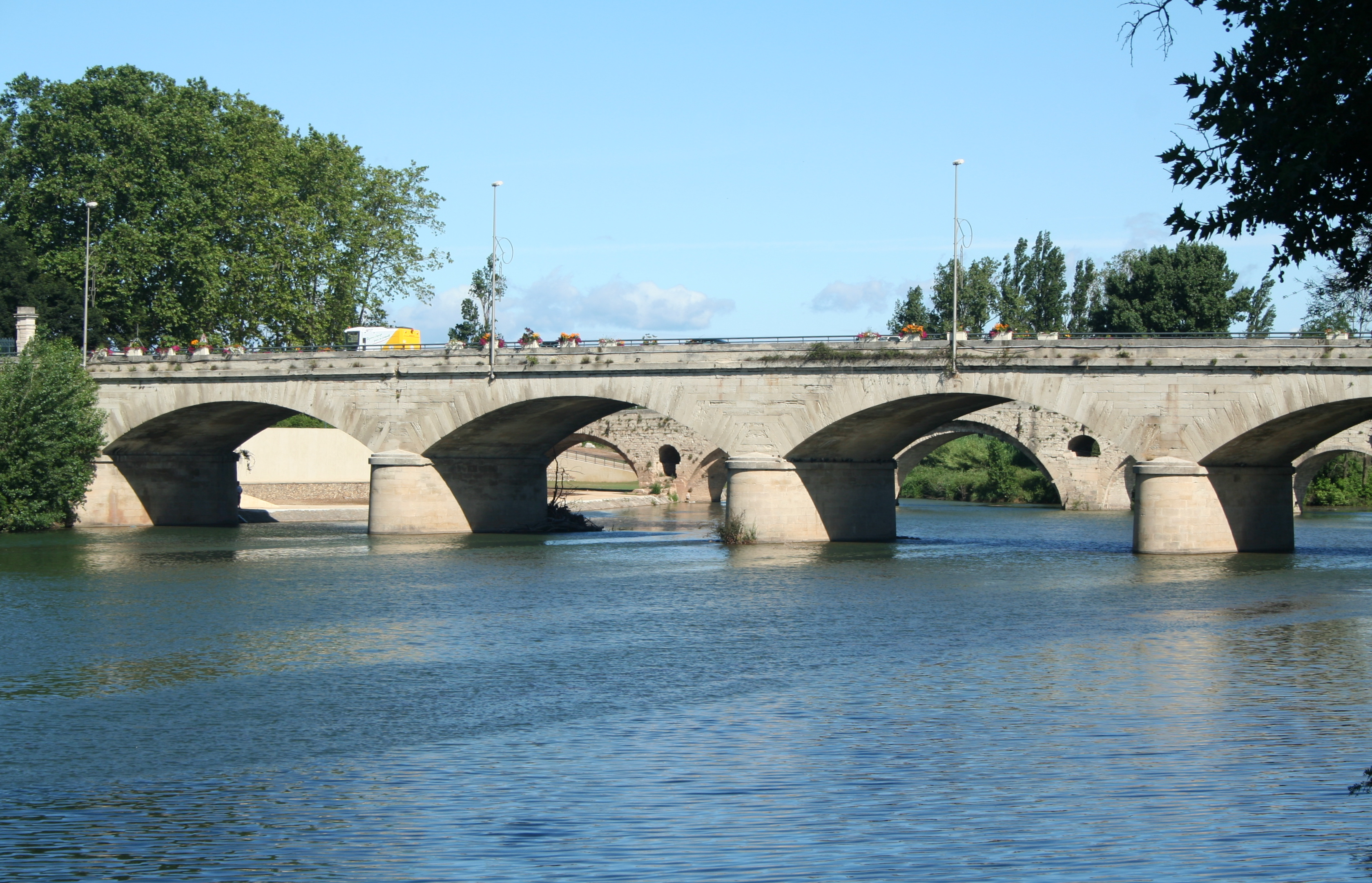 Béziers (Hérault) - Pont permettant à la Route nationale 112 (D 612b) de franchir l'Orb